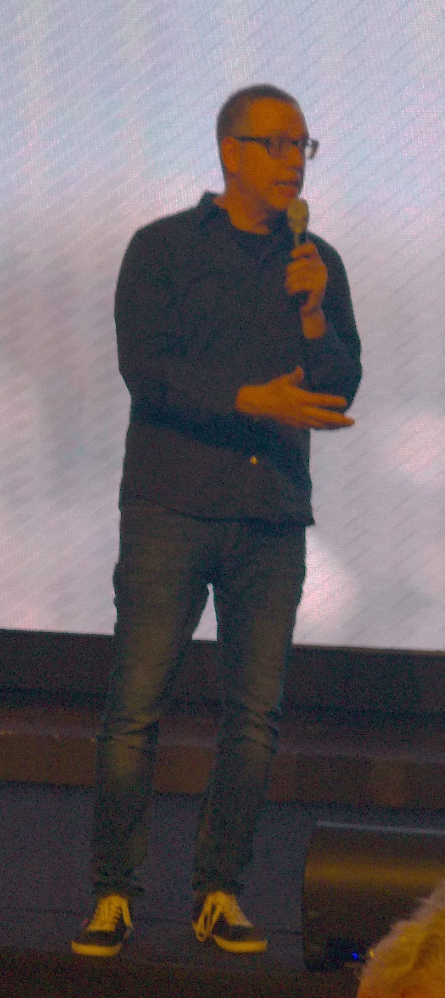 אייל דורון